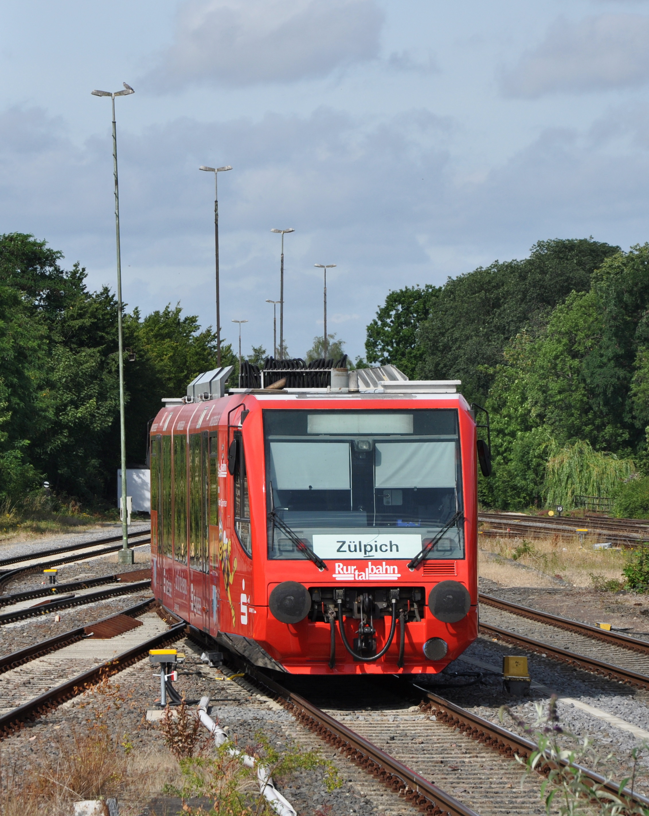 Regiosprinter mit Werbebeklebung für die Landesgartenschau 2014 als Bördeexpress im Bahnhof Euskirchen.